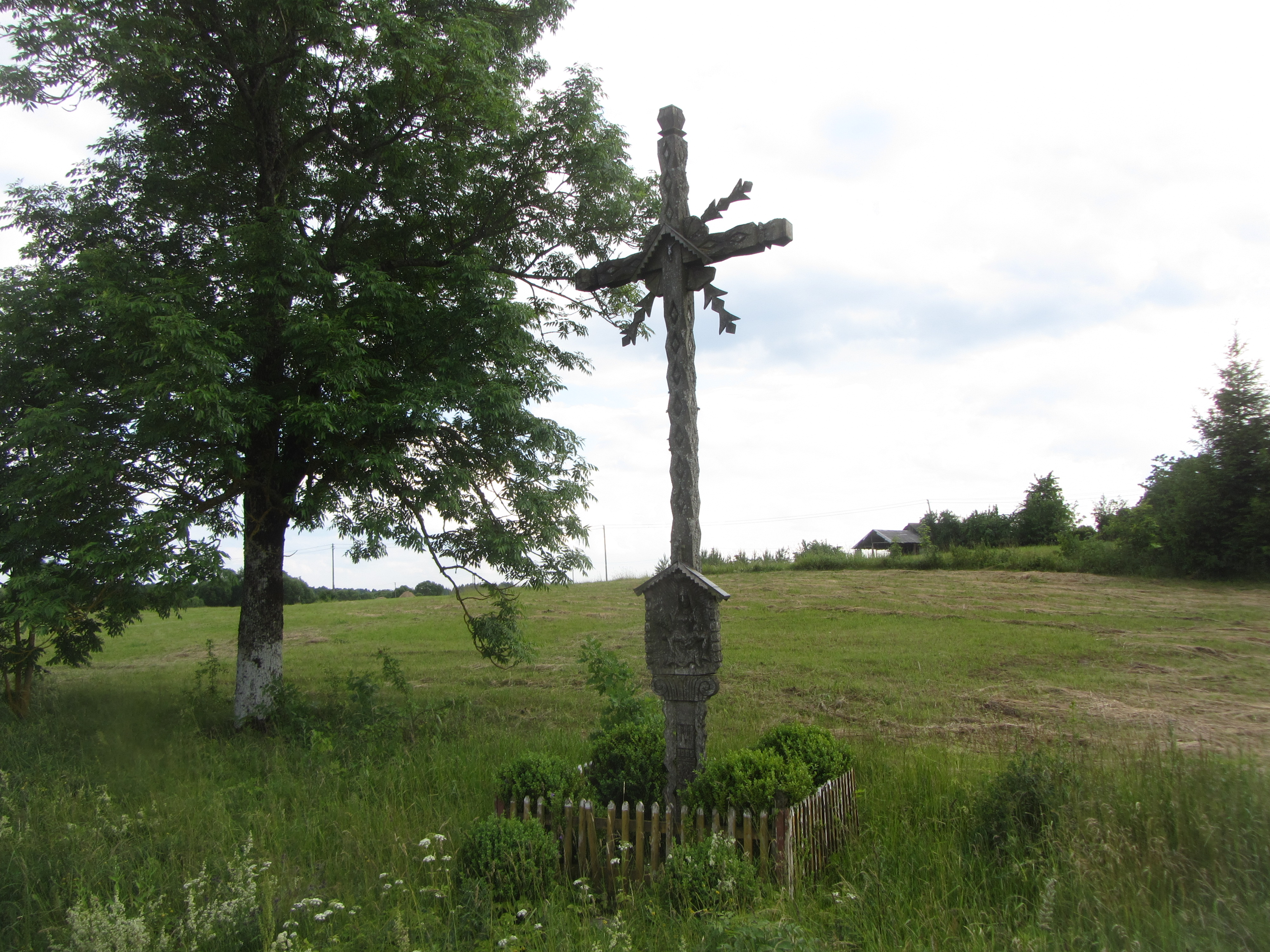 Pivašiūnų sen., Lithuania